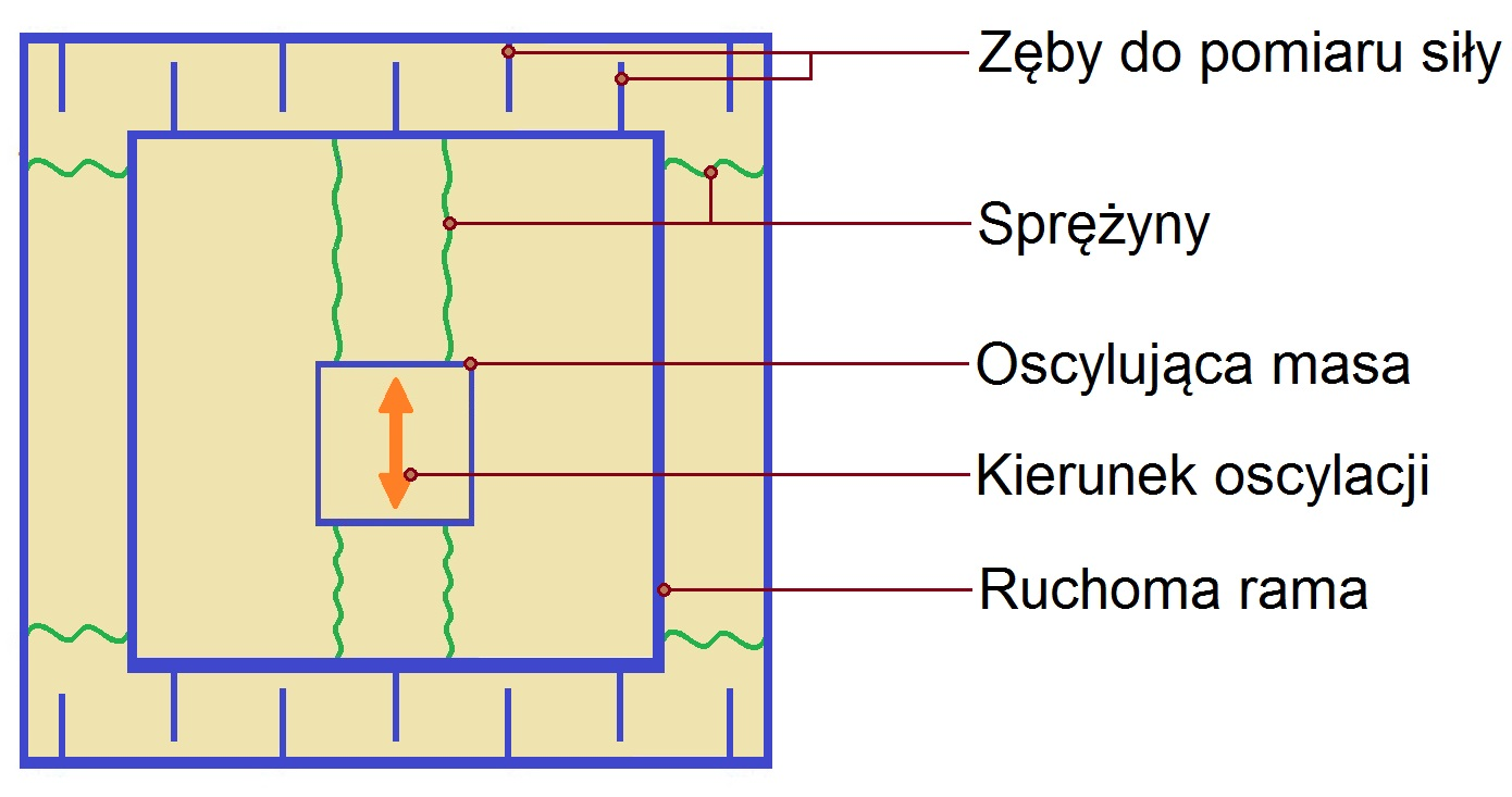 Schemat pokazujący konstrukcję mechanizmu do pomiaru przyśpieszenia stosując technologię MEMS